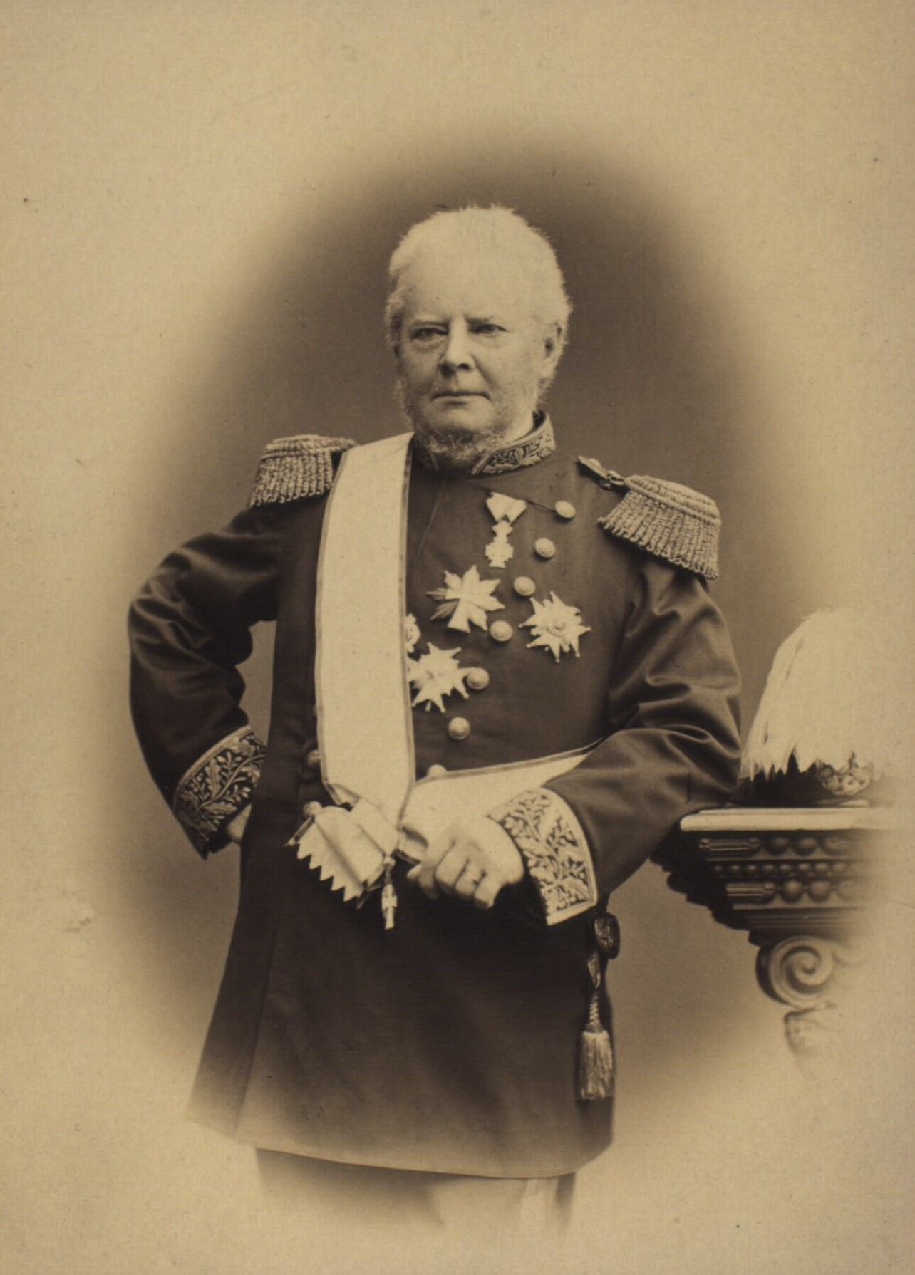 Ernst Emil Rosenørn (1810-1894), dansk embedsmand